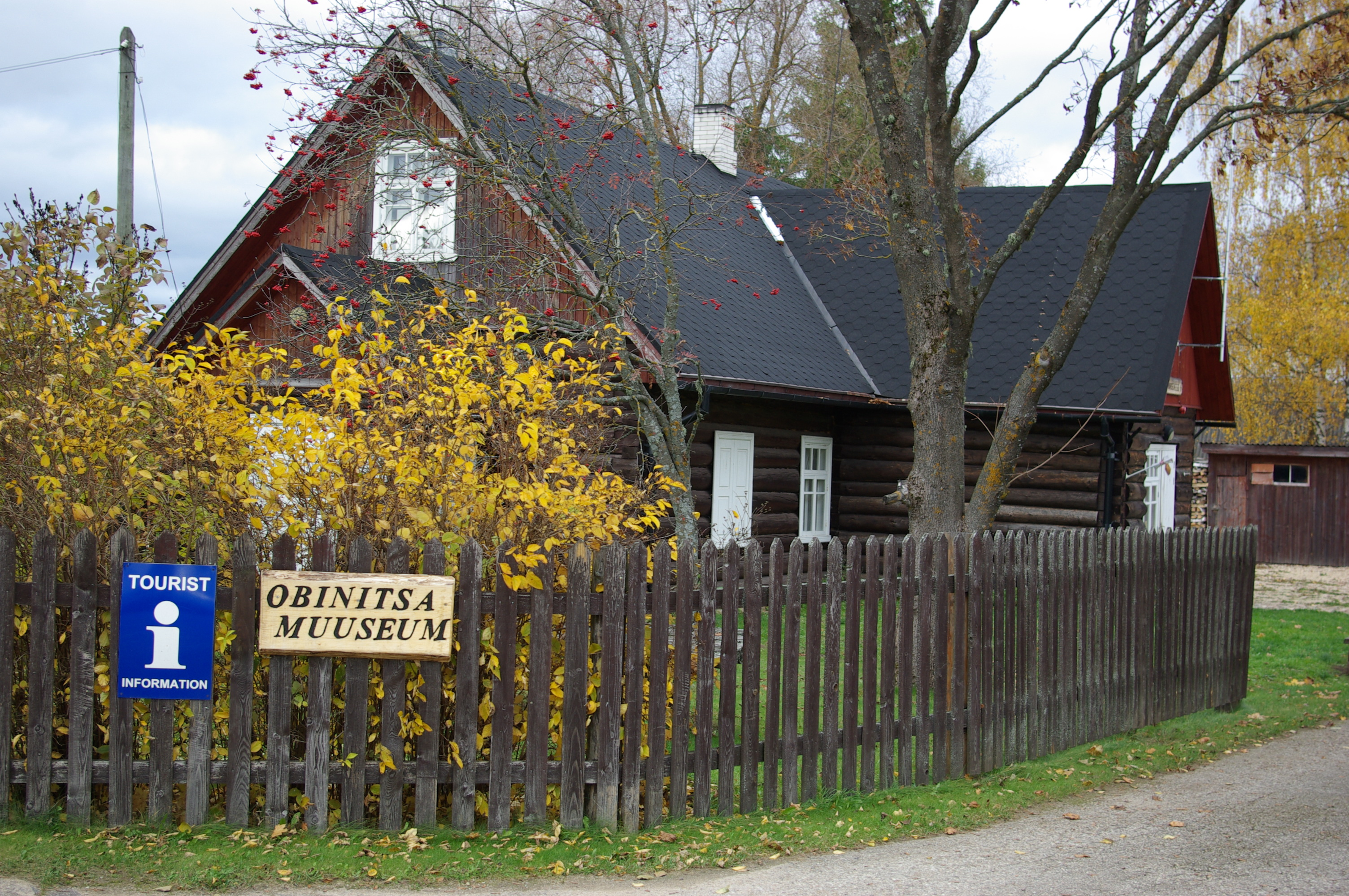 Obinitsa muuseum